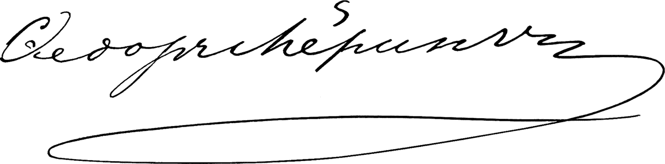 Подпись профессора Фридриха Меринга (1822–1887)